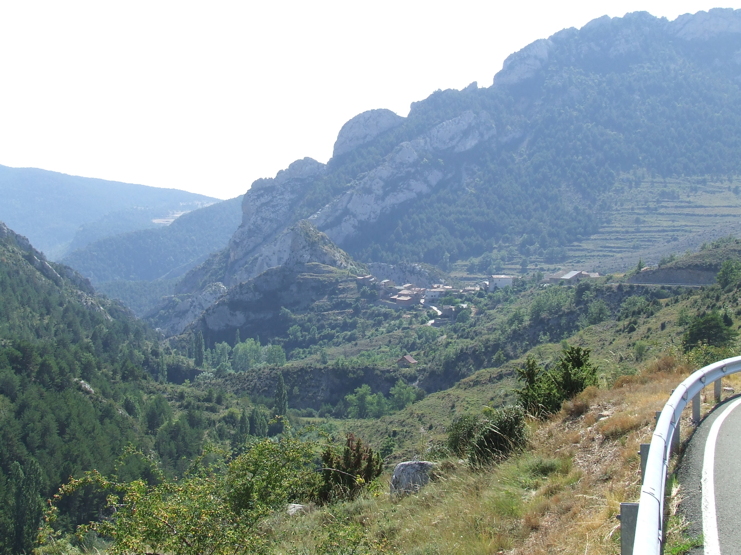 L'extrem de llevant de la Serra de Carrànima (Bóixols, Abella de la Conca, Pallars Jussà)